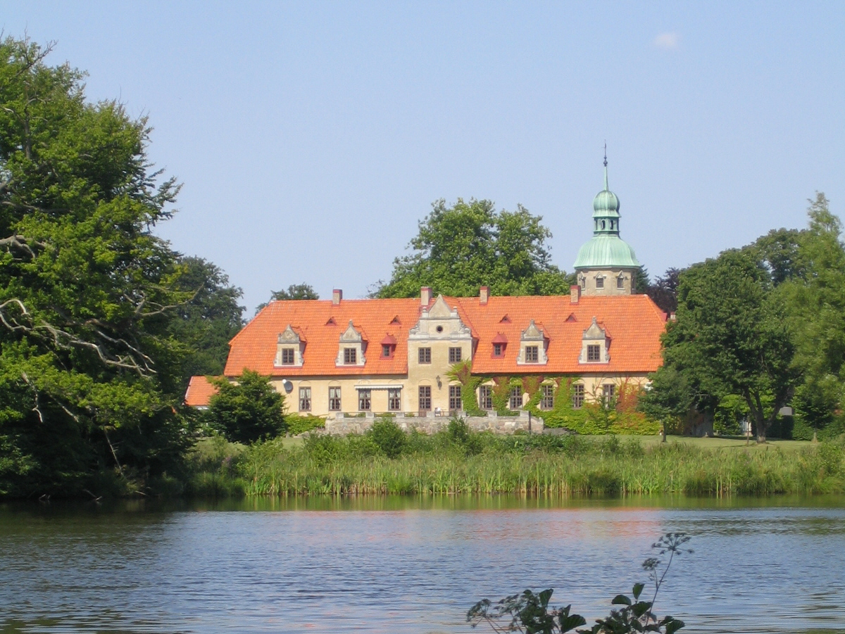 Toppeladugårds slott. Bilden tagen av mig själv 20 augusti 2005.